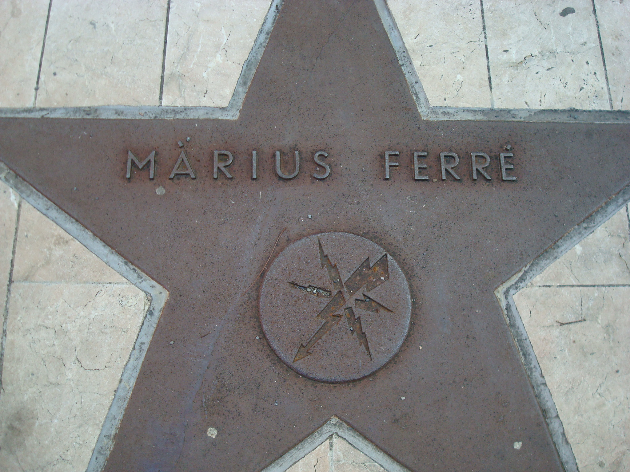 Estrella Marius Ferre